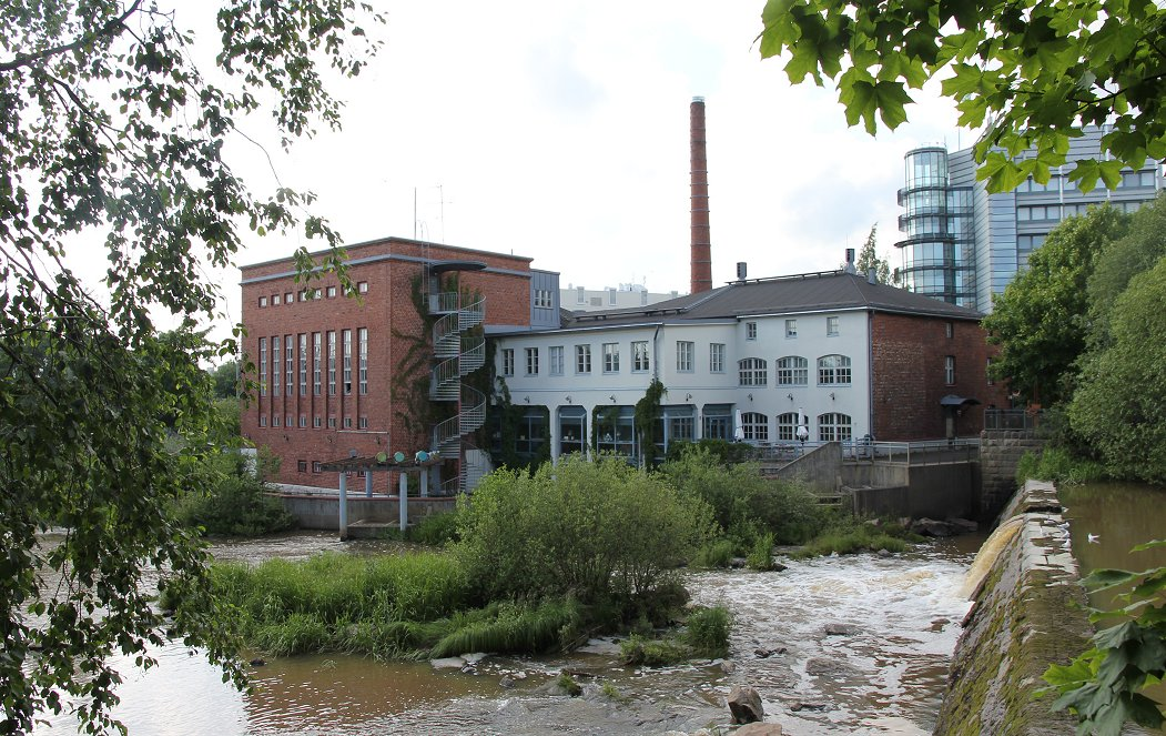 Lasten ja nuorten kulttuuri- ja monitoimitalo Vernissa, Tikkurila, Vantaa. Etualalla Kerevanjoen Tikkurilankoskea.